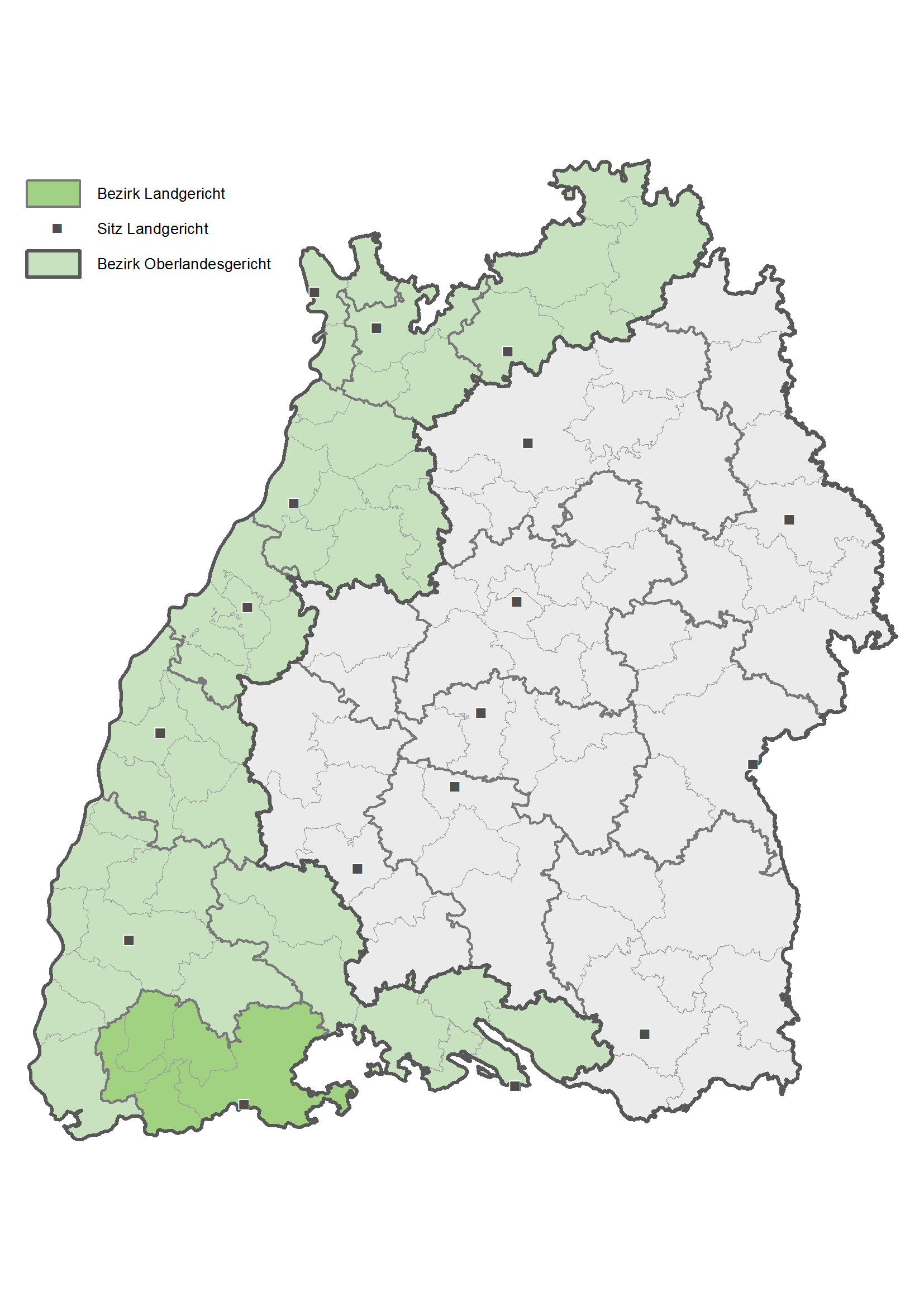 Karte des Bezirks des Landgerichts Waldshut-Tiengen in Baden-Württemberg